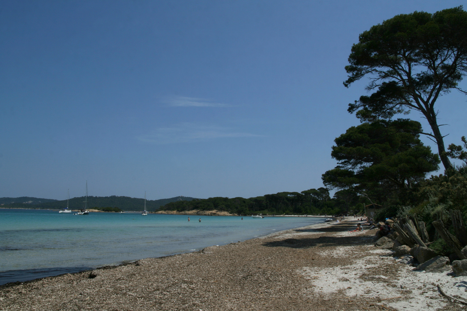 Plage Argent à Porquerolles